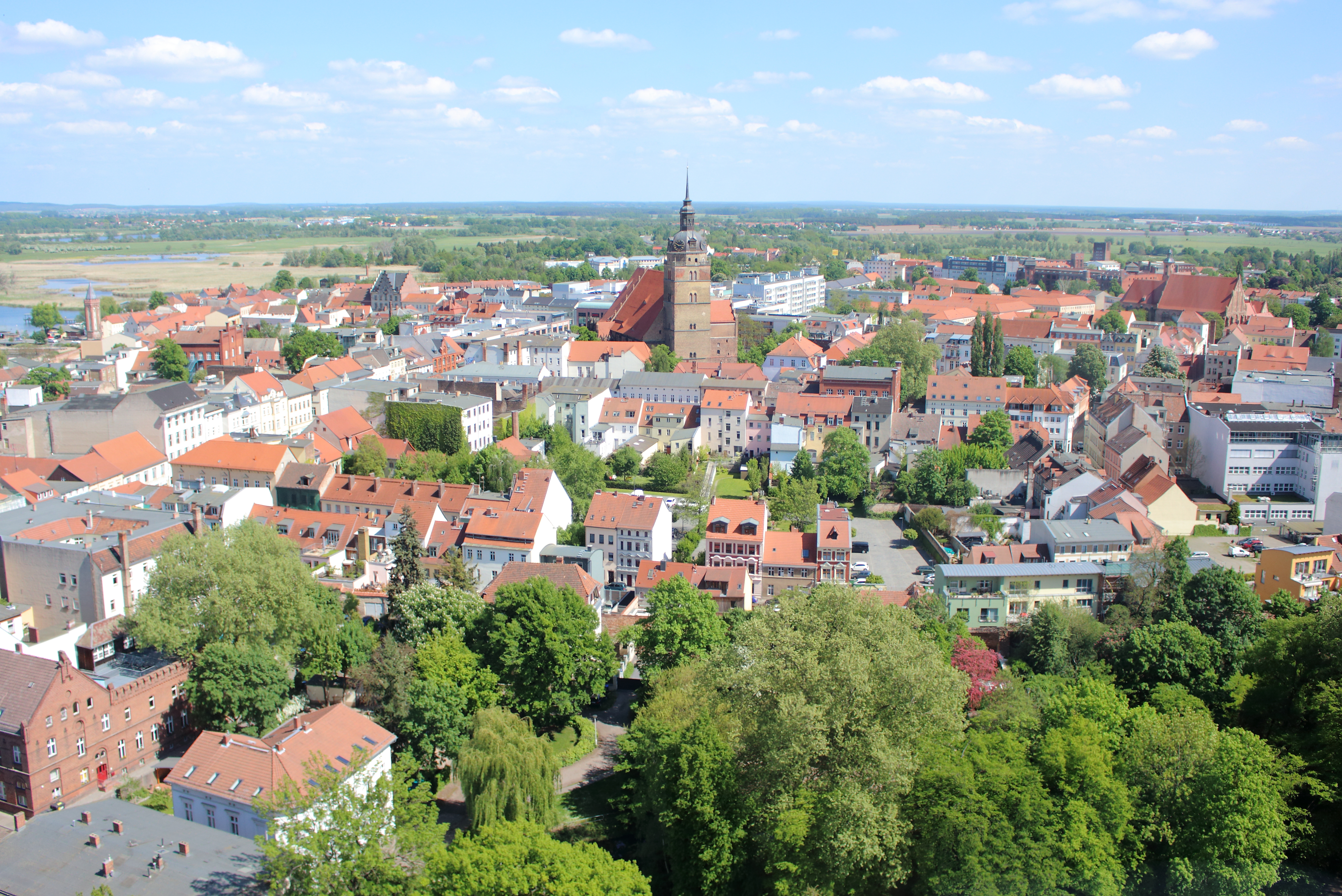 Brandenburg an der Havel vom Skyliner während der BUGA 2015